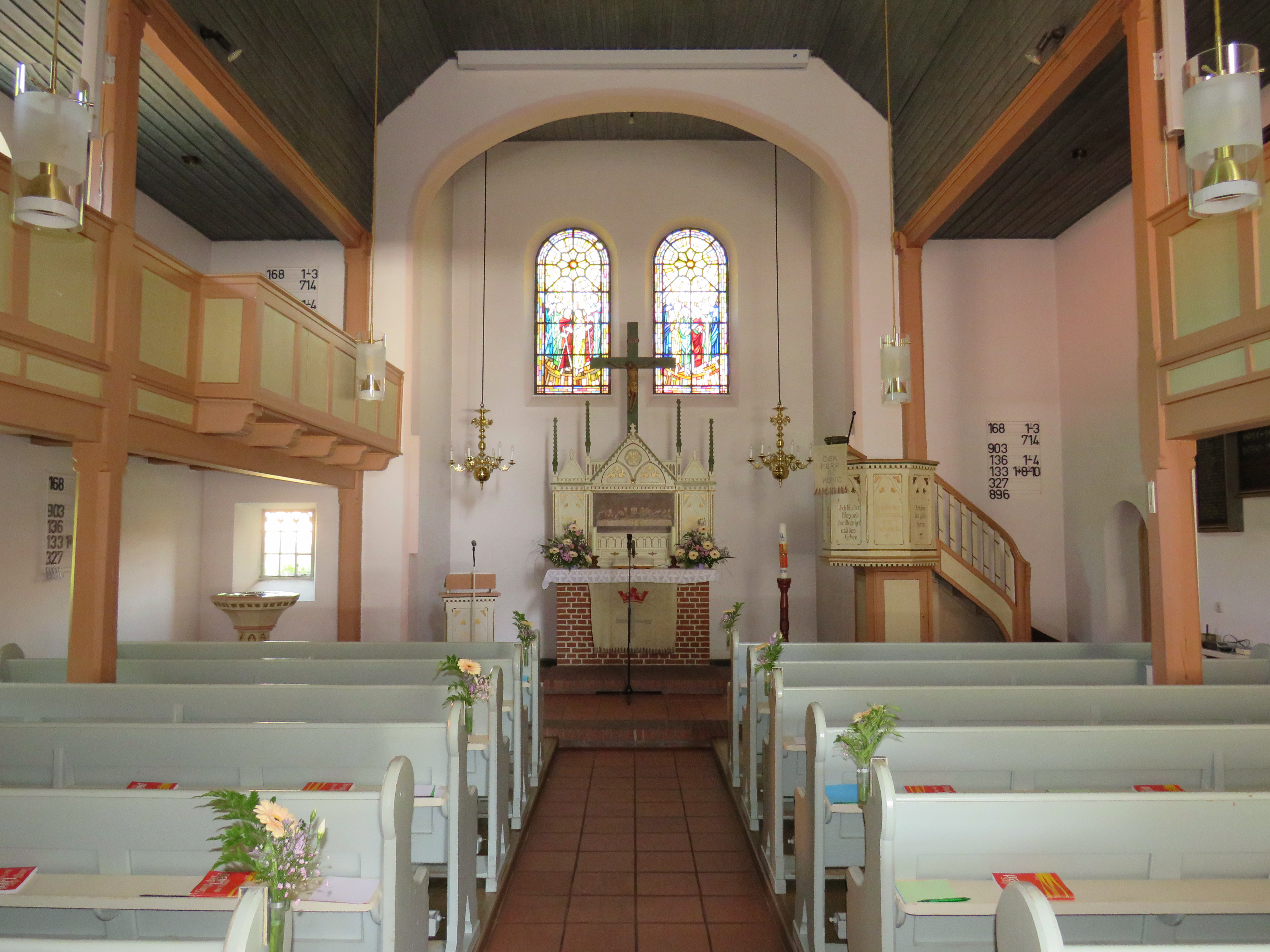 Andreaskirche Firrel innen 1